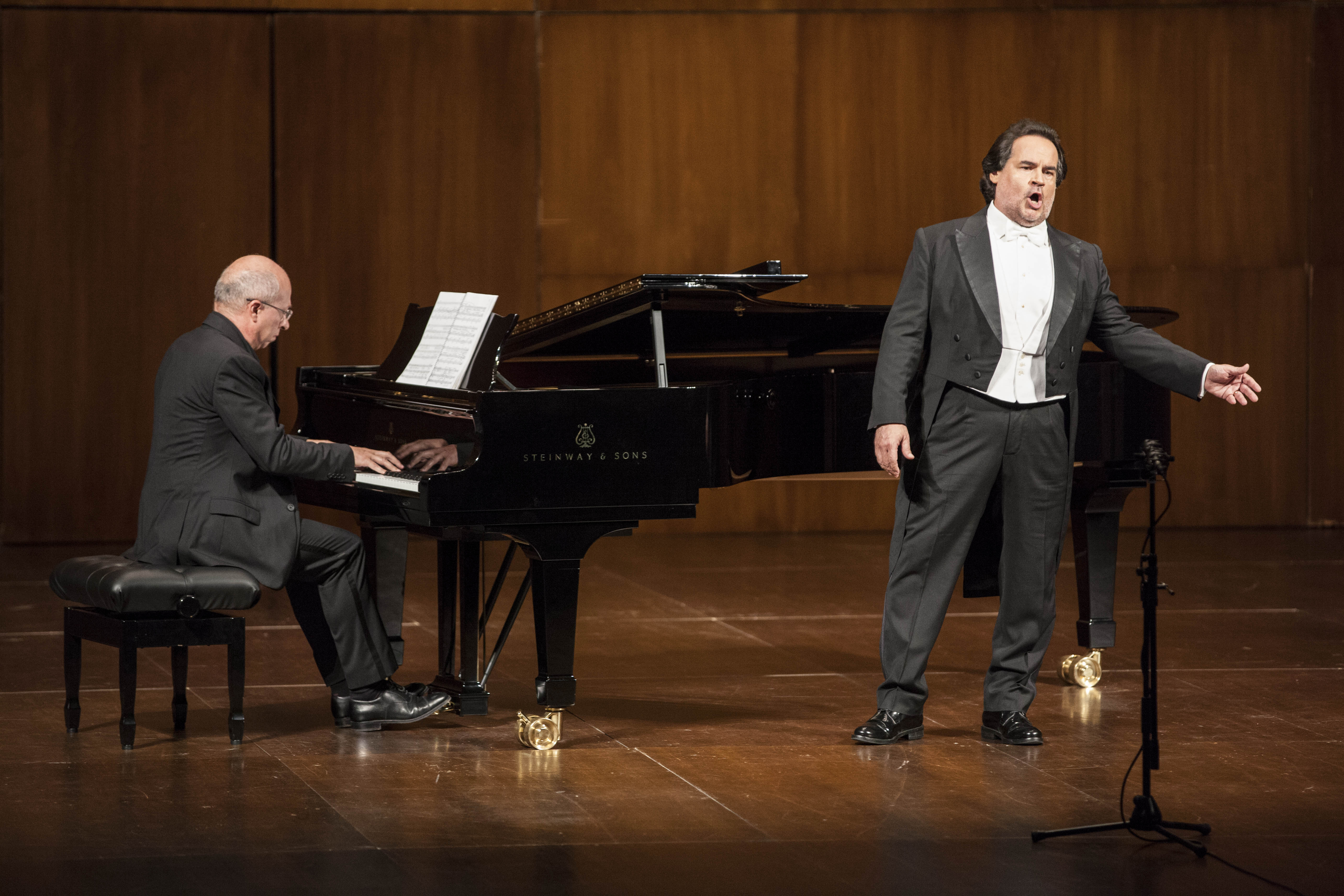 © Quincena Musical-Iñigo Ibáñez